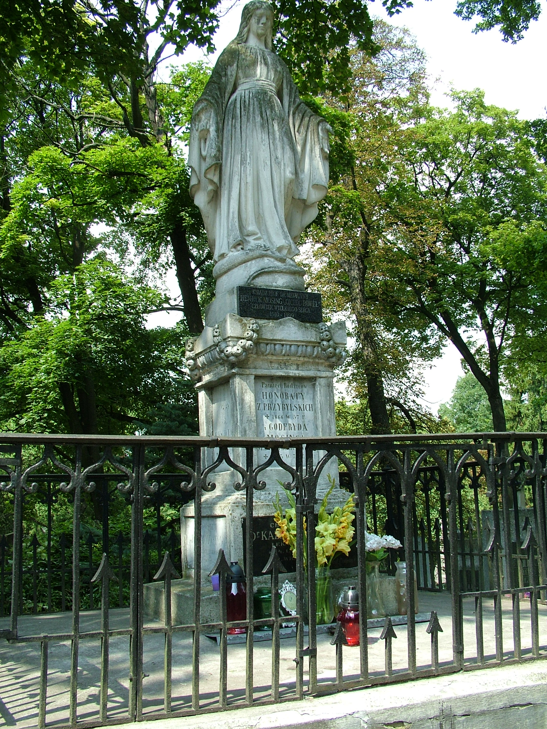 Grobowiec Mosingów na cmentarzu Łyczakowskim. Sierpień 2007. Fot. Stanisław Kosiedowski.